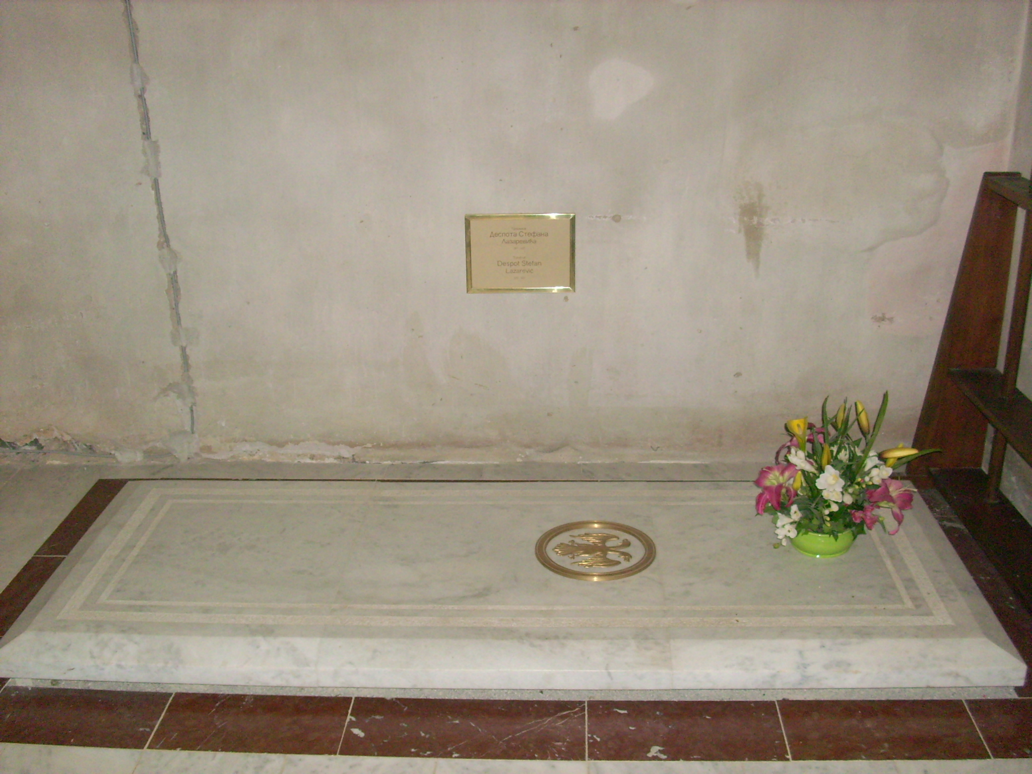 Мермерна плоча, испод које се, по мишљењу дела стручњака, налазе мошти Стефана Лазаревића.